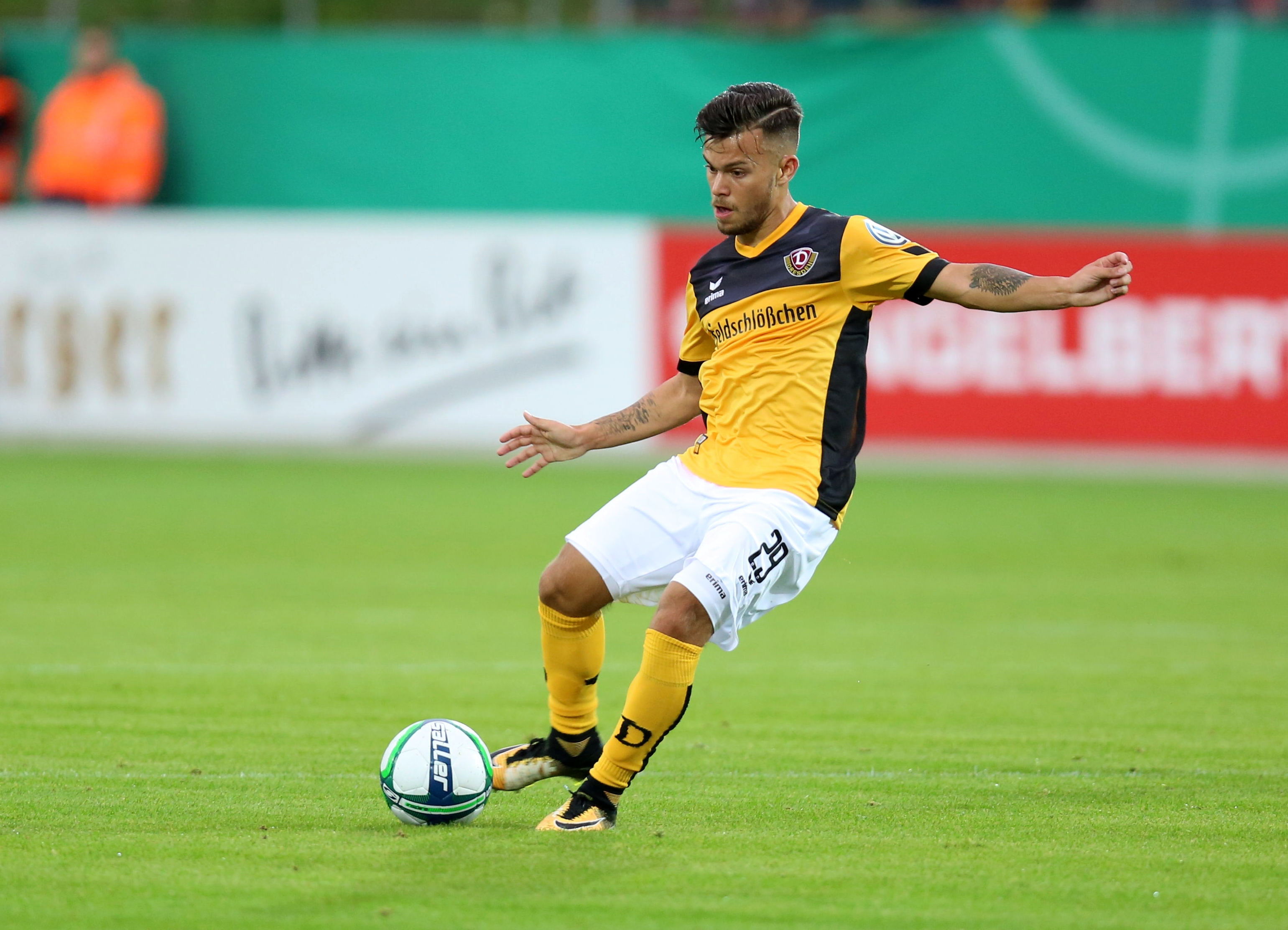 DFB-Pokal 2017/18, 1. Hauptrunde, TuS Koblenz gegen SG Dynamo Dresden: Sascha Horvath (SG Dynamo Dresden) im Gespräch mit Schiedsrichter Markus Schmidt